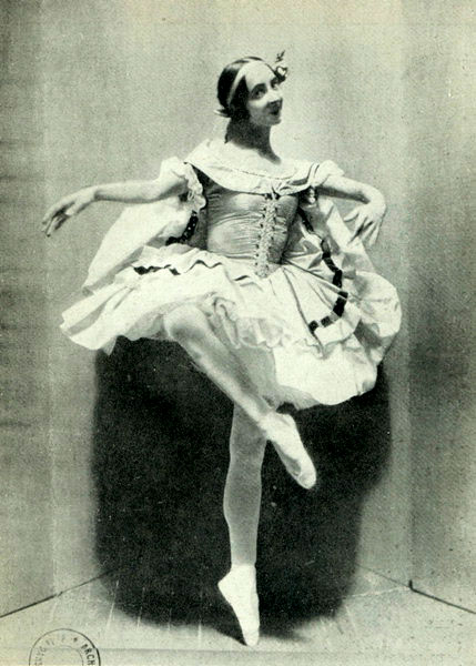 Olga Spessivtseva. "Esmeralde?"